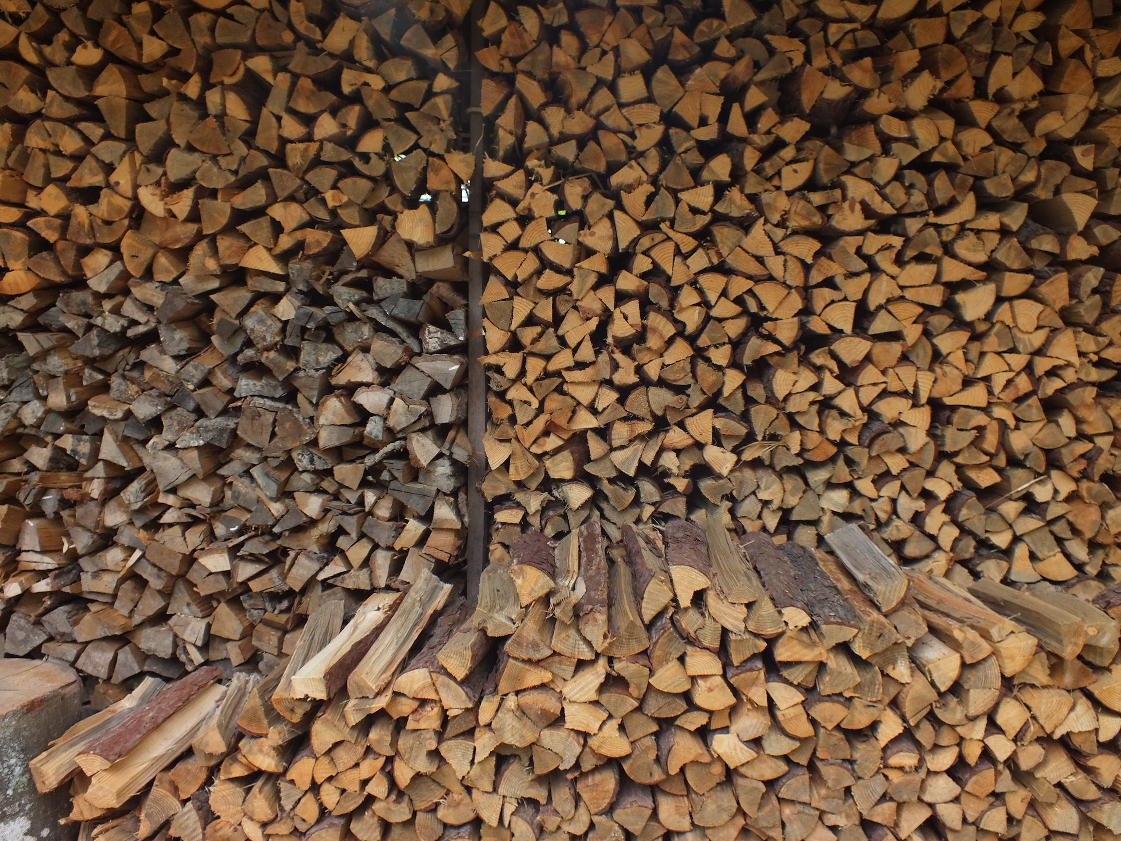 Stacks of firewood,Wood wall 薪 やしろの森公園